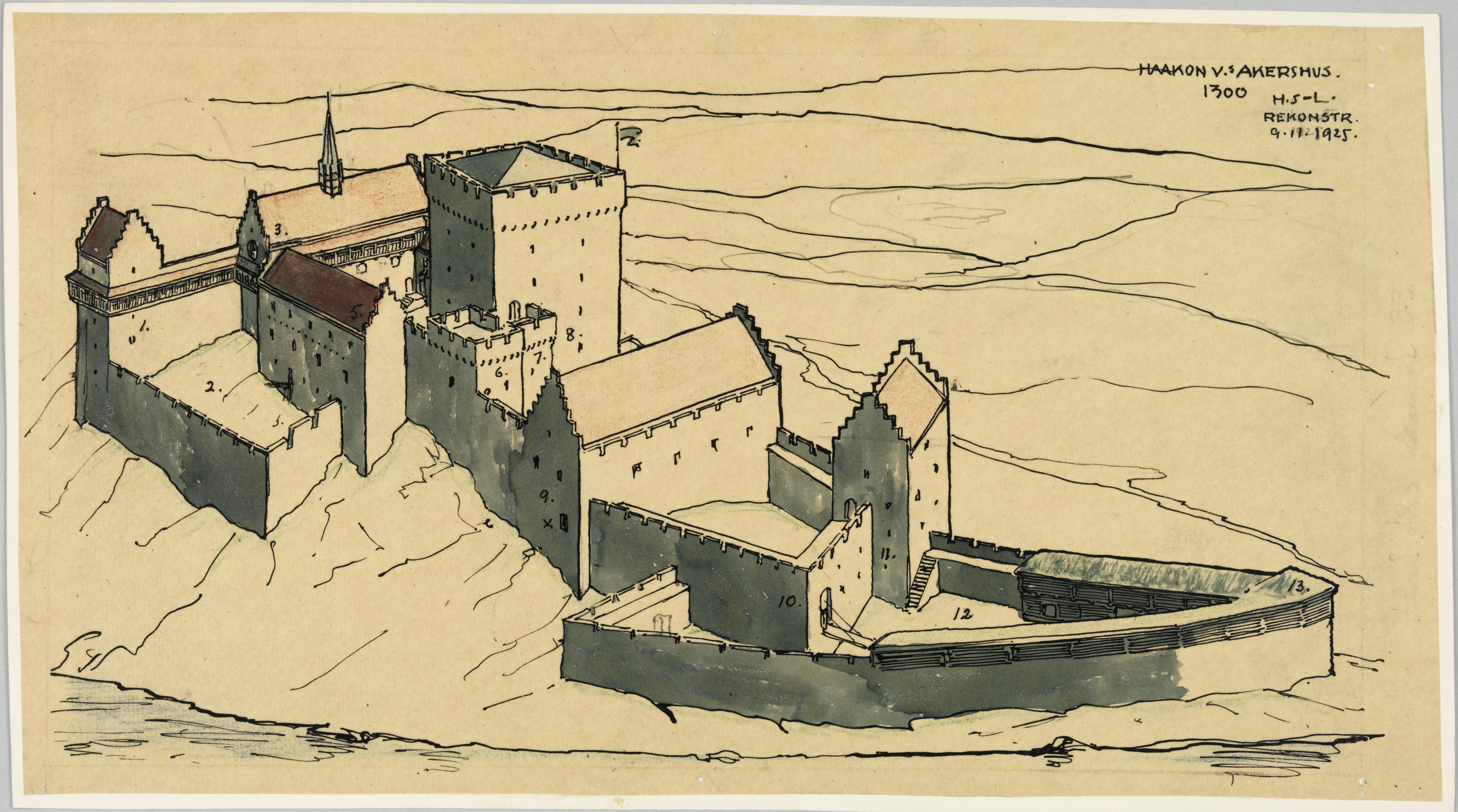 Illustrasjon hentet fra et privatarkiv i Nasjonalbiblioteket med tittelen "Kolorert tegning av Haakon Vs Akershus år 1300. Rekonstruksjon av 09.11.1925" av Holger Sinding-Larsen